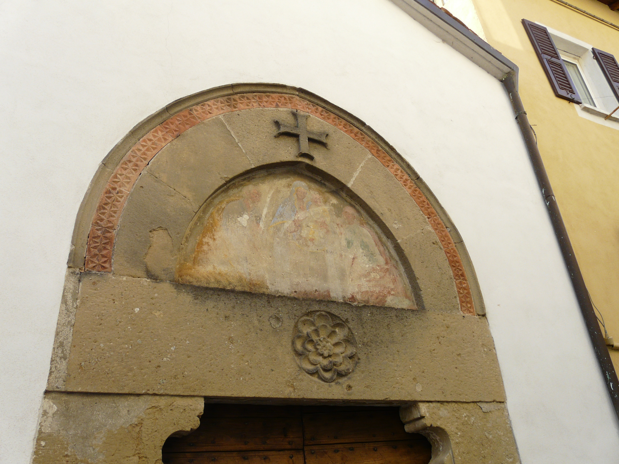 Particolare della lunetta della chiesa di San Pietro, Borgata di Piano, Murialdo, Liguria, Italia